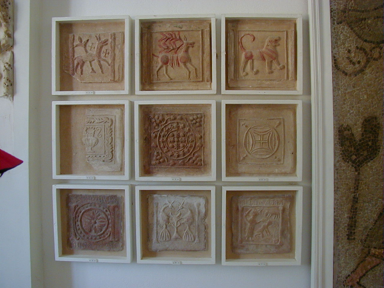 Carreaux de céramique à motif chrétien, MNC (Carthage-Tunisie)